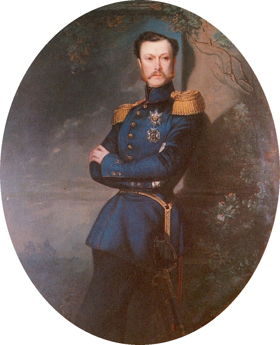 König Karl als Kronprinz